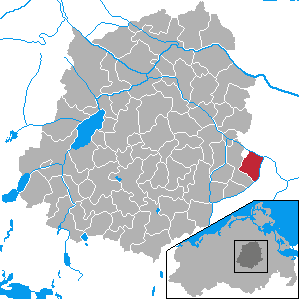 Siedenbollentin, Landkreis Demmin, Mecklenburg-Vorpommern